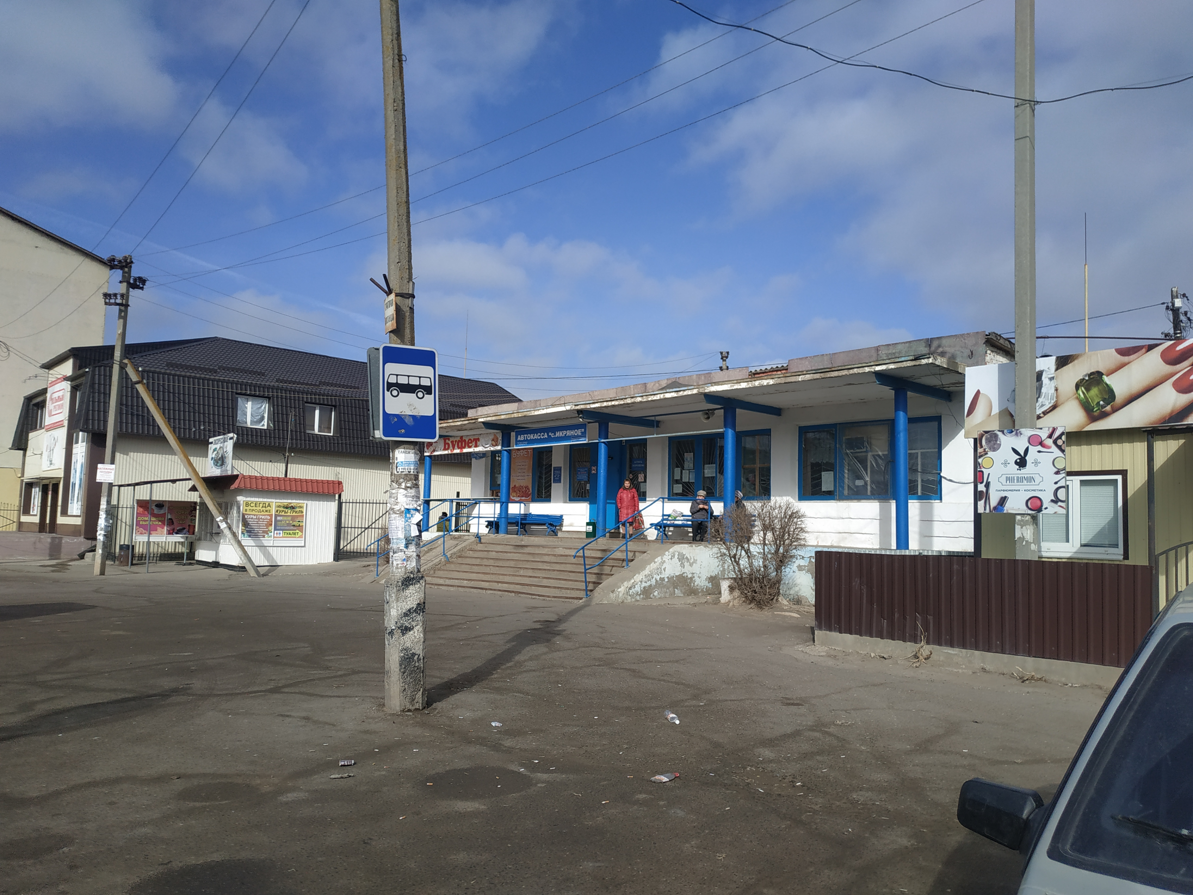 Астраханская область, Икряное